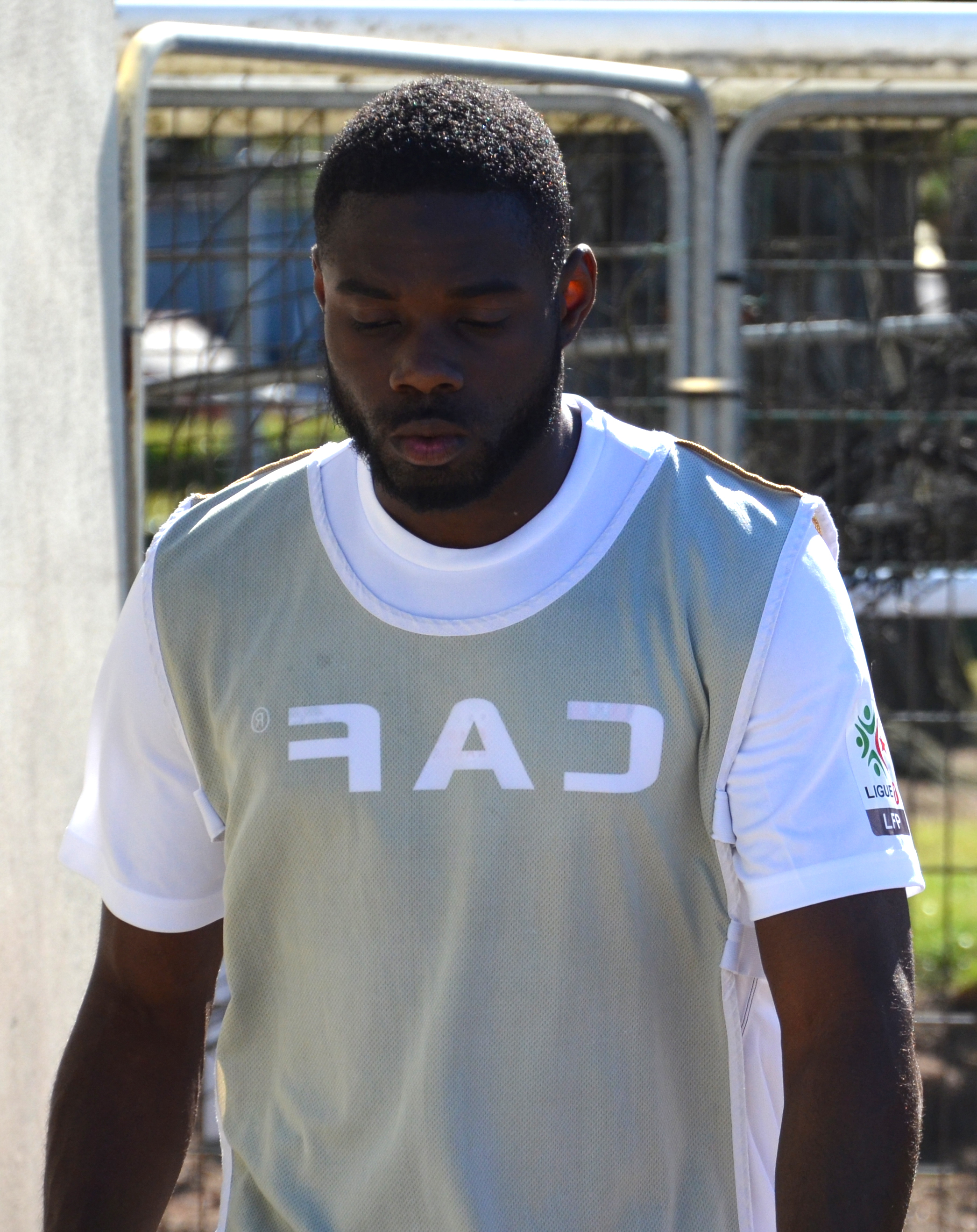 Photographie prise lors du match opposant le Stade rennais à l'USM Alger en match amical au stade Paul-Audrin de Dinard le 16 juillet 2016. Ici, Ghislain Guessan.